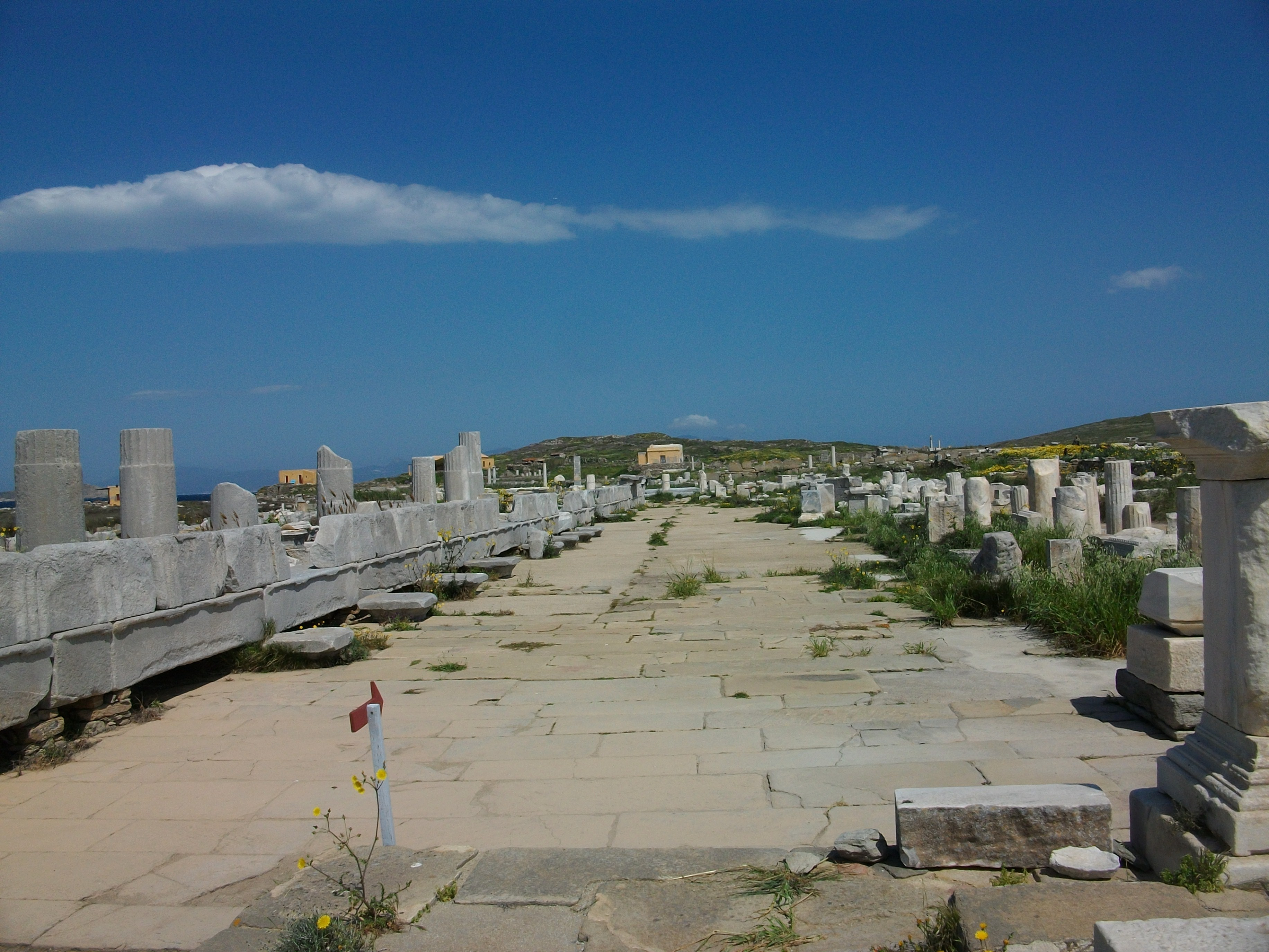 Stoà de Filip V i stoà sud, Via Sacra de Delos.